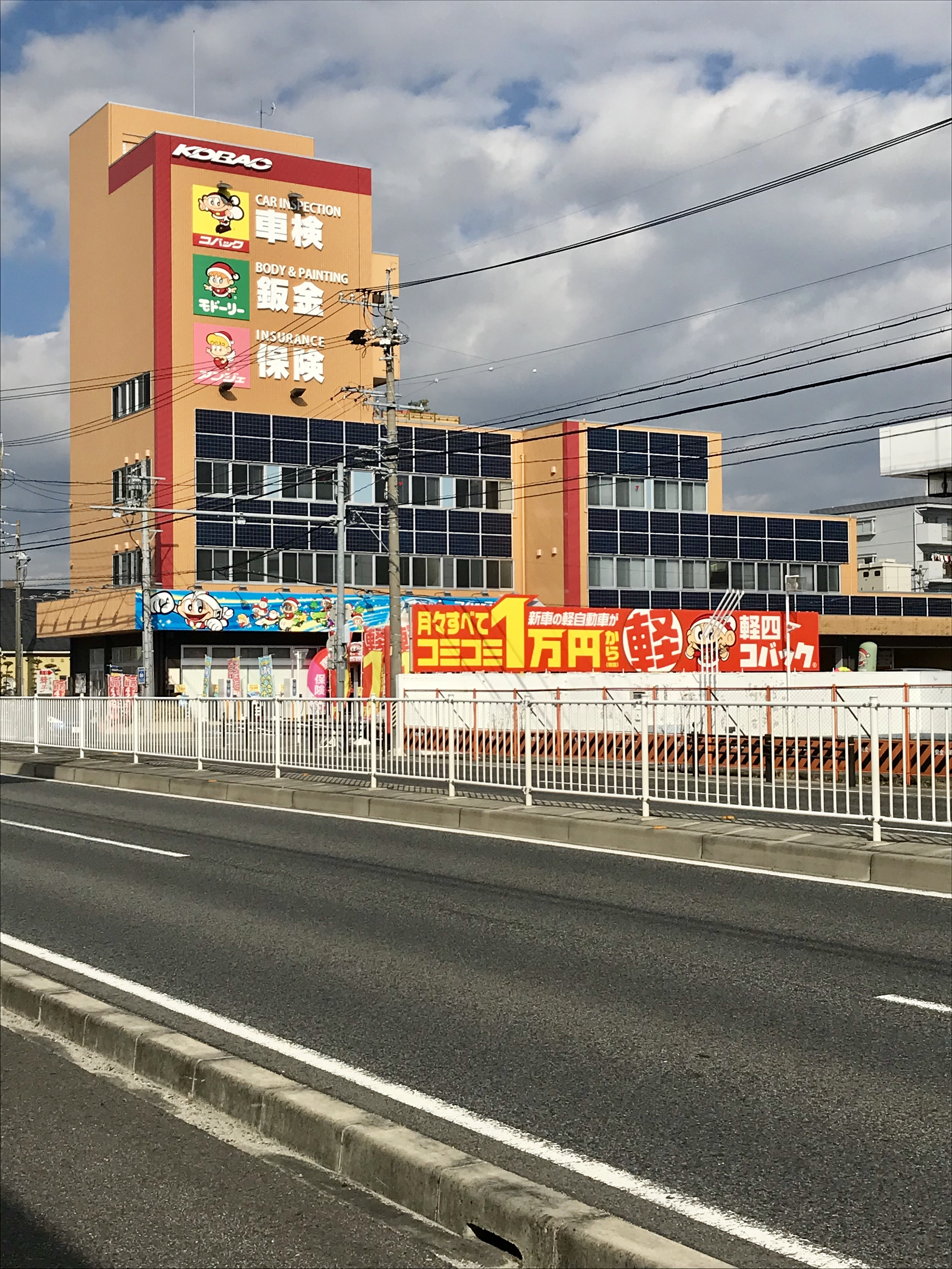 愛知県豊田市梅坪町の国道419号線からコバック豊田梅坪店を撮影した写真。